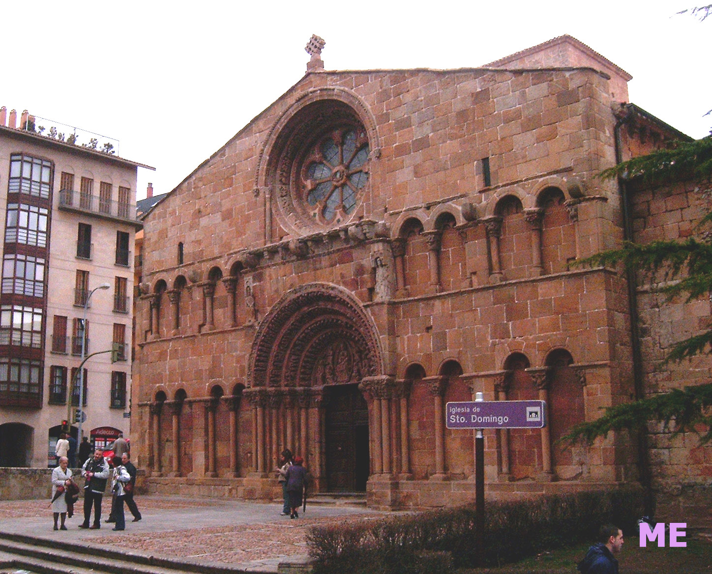 Fachada románica de la iglesia de Santo Domingo en Soria.